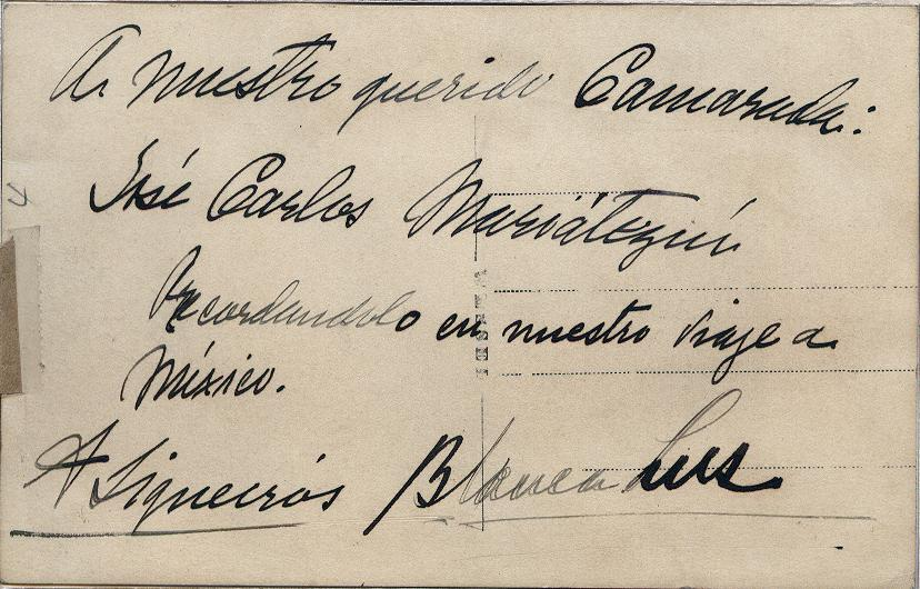 Postal a JCM (retira) "A nuestro querido Camarada: José Carlos Mariátegui Recordándolo en nuestra viaje a México A Siqueiros Blanca Luz"